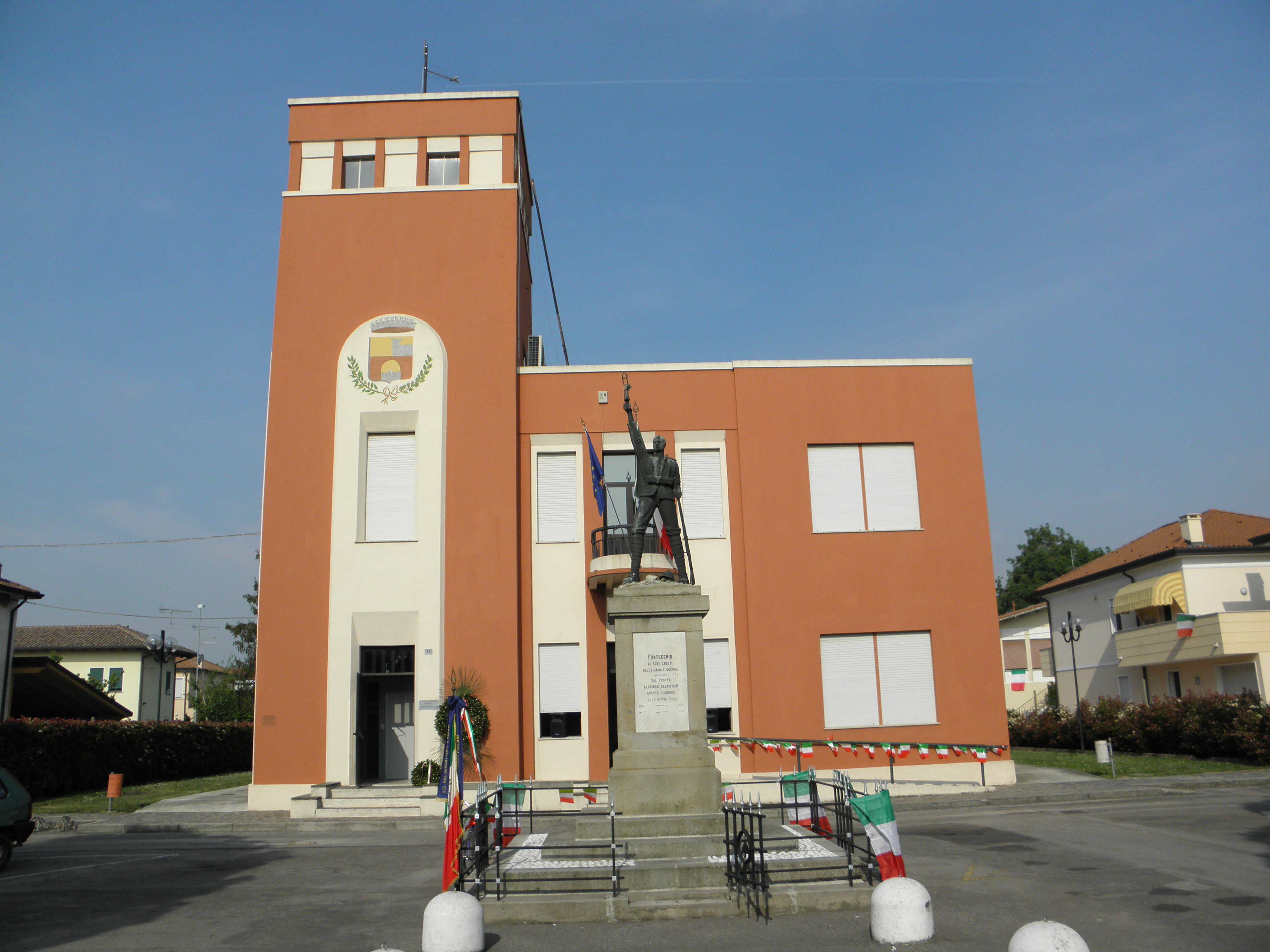 Pontecchio Polesine: il municipio ed il monumento ai caduti della Grande Guerra posto nella piazza antistante.